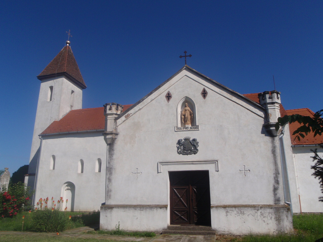 Somlószőlős rk templom